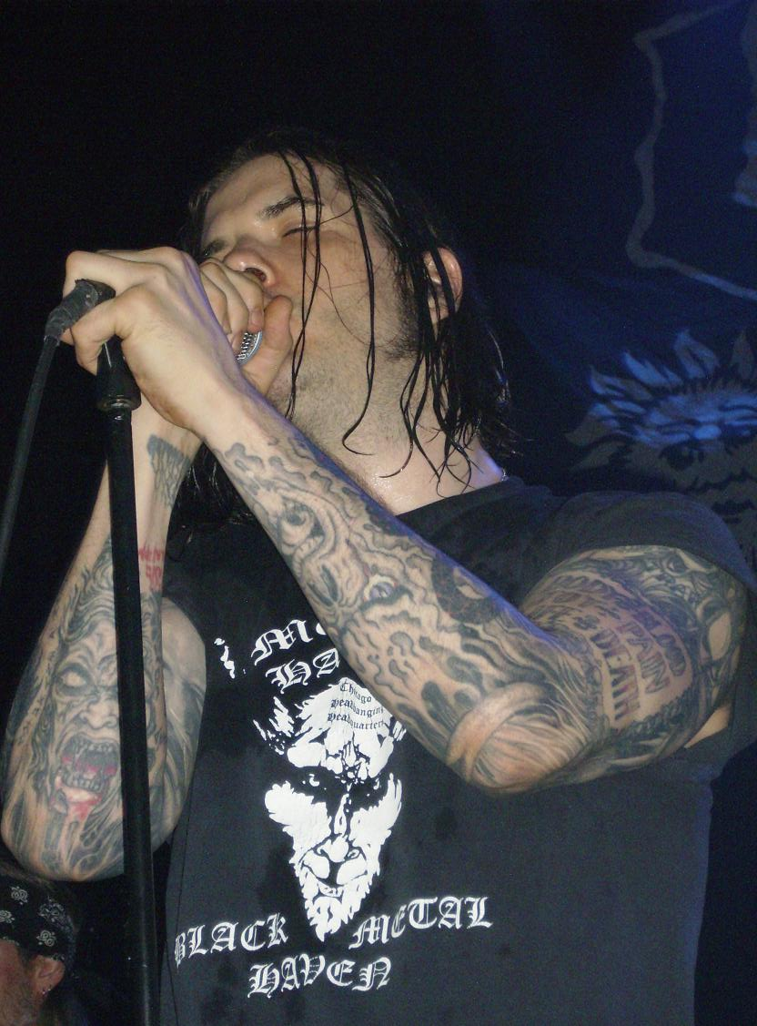 Phil Anselmo in Sala Joy Eslava, Madrid